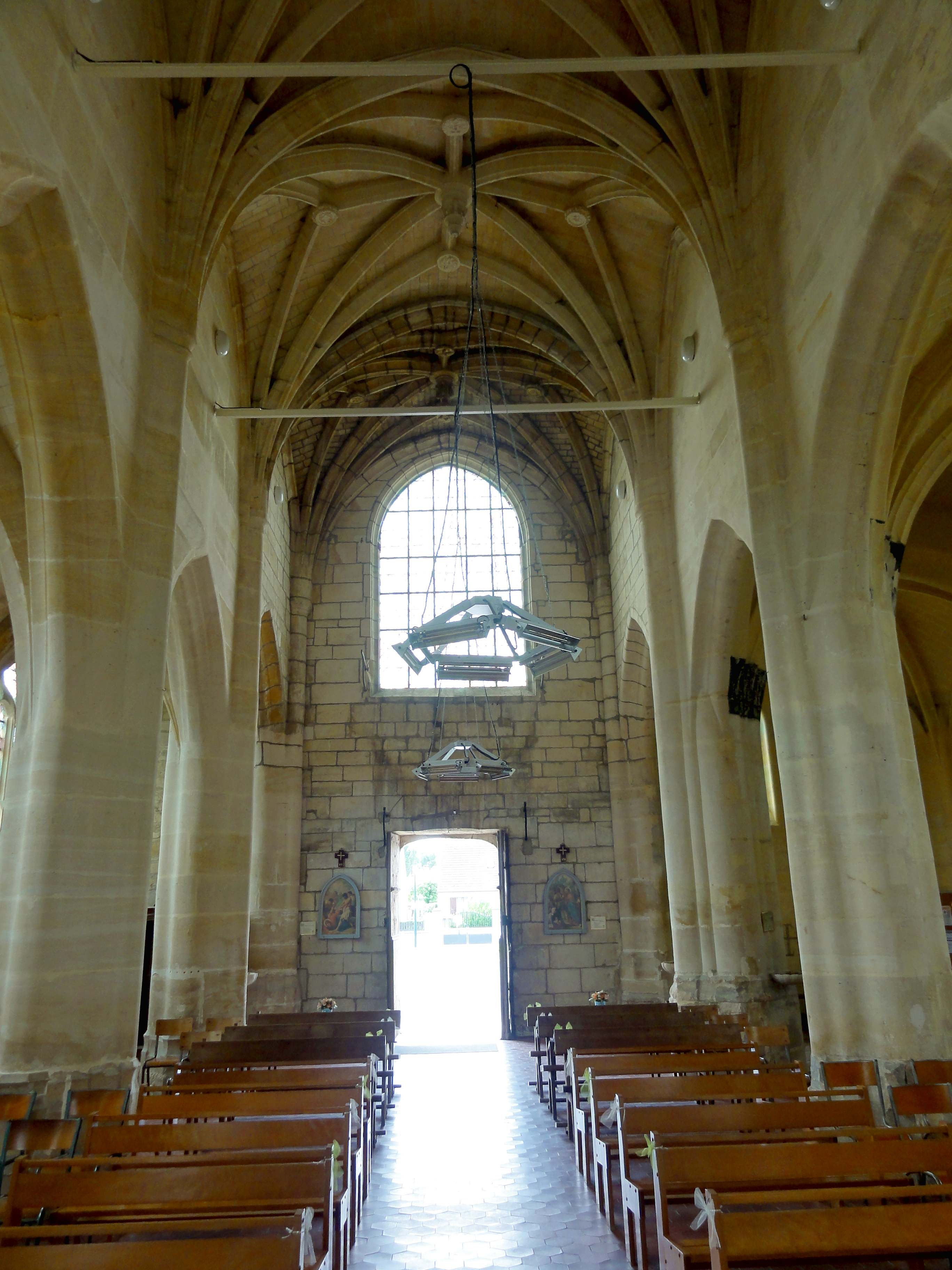 Intérieur de l'église - voir titre.